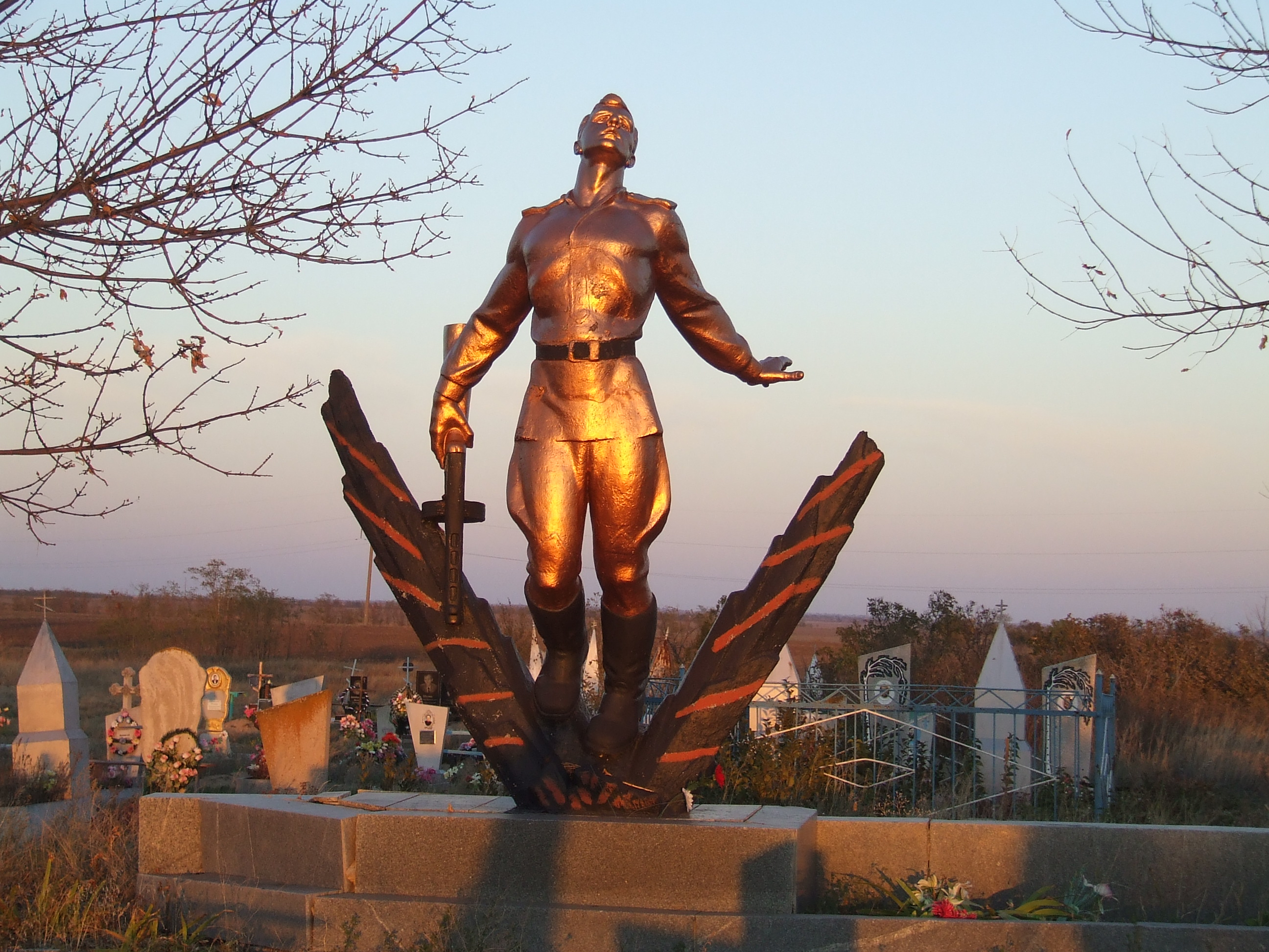 Група братських могил (8) радянських воїнів та могила Матюха П. І. - Героя Радянського Союзу. Поховано 80 чол., Токмак, вул. Степова, на громадянському кладовищі